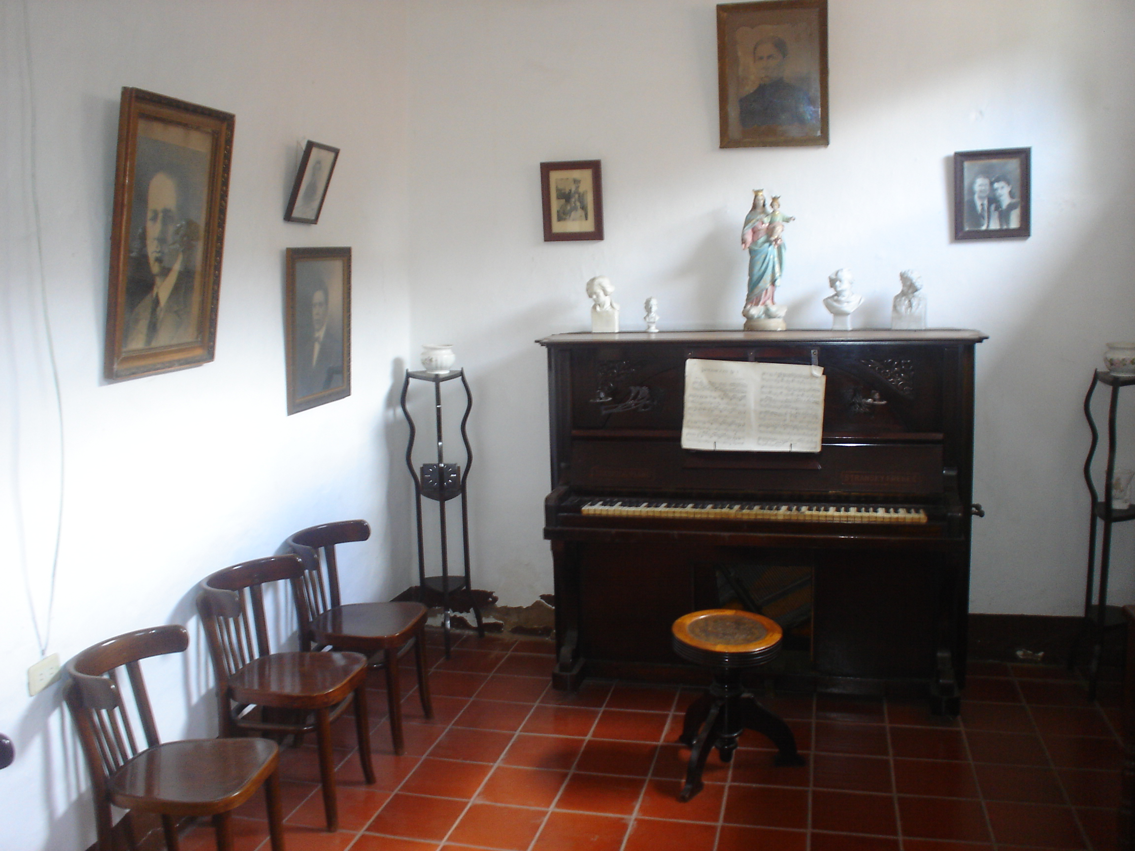 Piano del compositor Luis A. Calvo que se encuentra en el Museo dedicado a la promoción de su vida y de su obra. Agua de Dios, Colombia.